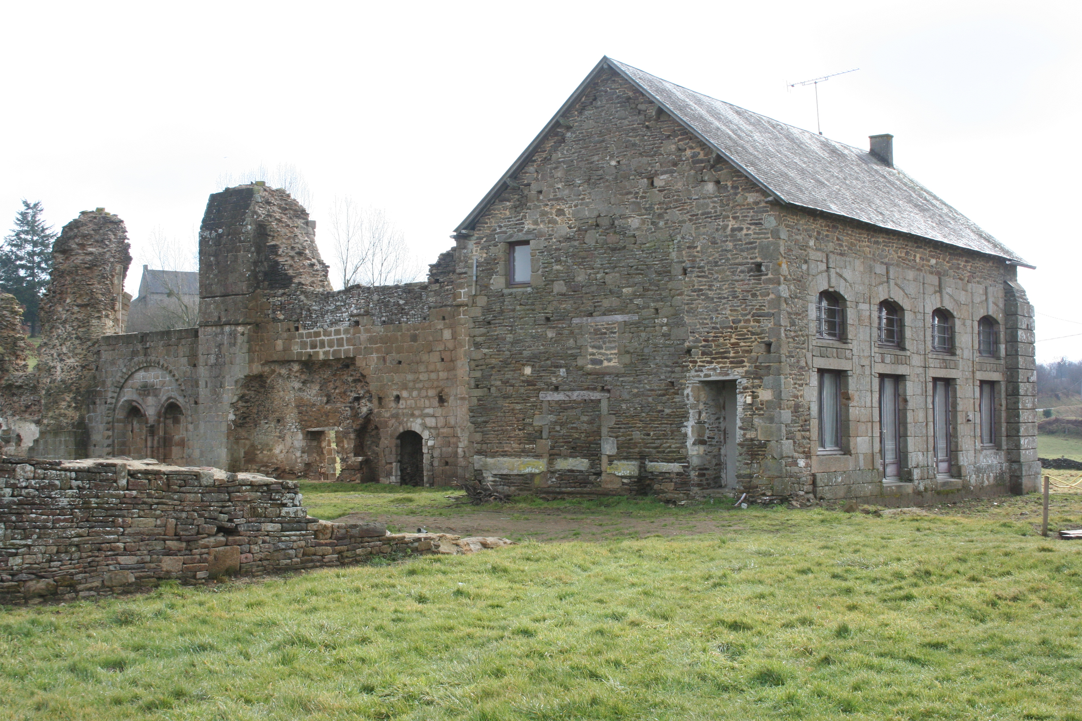 Élément de construction beaucoup plus récente que l'abbaye en elle-même, extrémité de l'hôtellerie avec un font le porche menant vers l'extérieur du cloitre. Vue des ruines de l'abbaye de savigny le vieux, manche, france